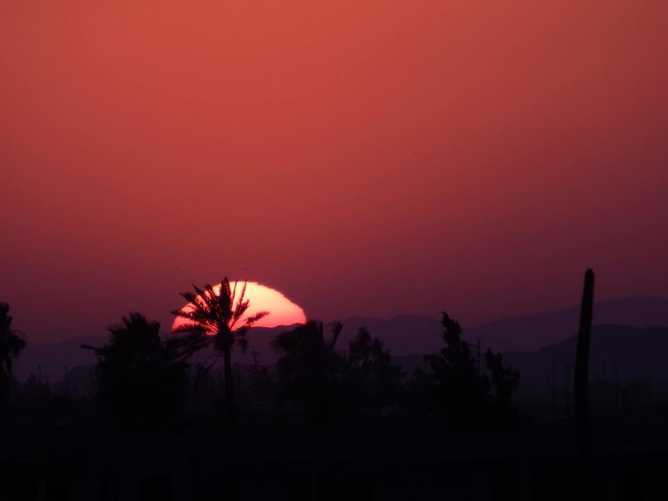 Durant l'été à Marrakech le ciel nous présente une palette de couleur asse exceptionnelle. A chaque levé et couché du soleil le ciel s'enflamme pour ensuite s'éteindre dans la noir pénombre ou se métamorphose en bleu pastelle.